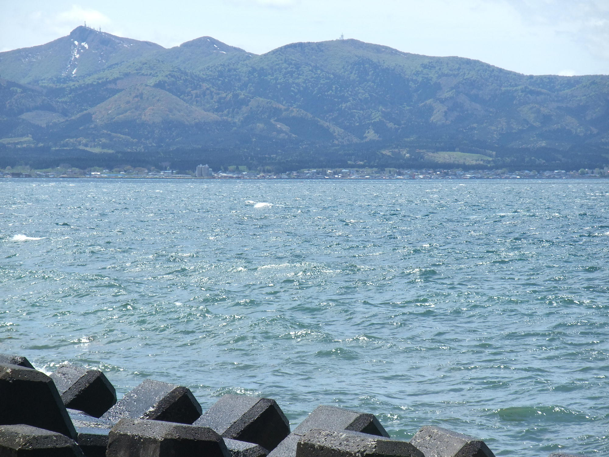 烏帽子岳（青森県）